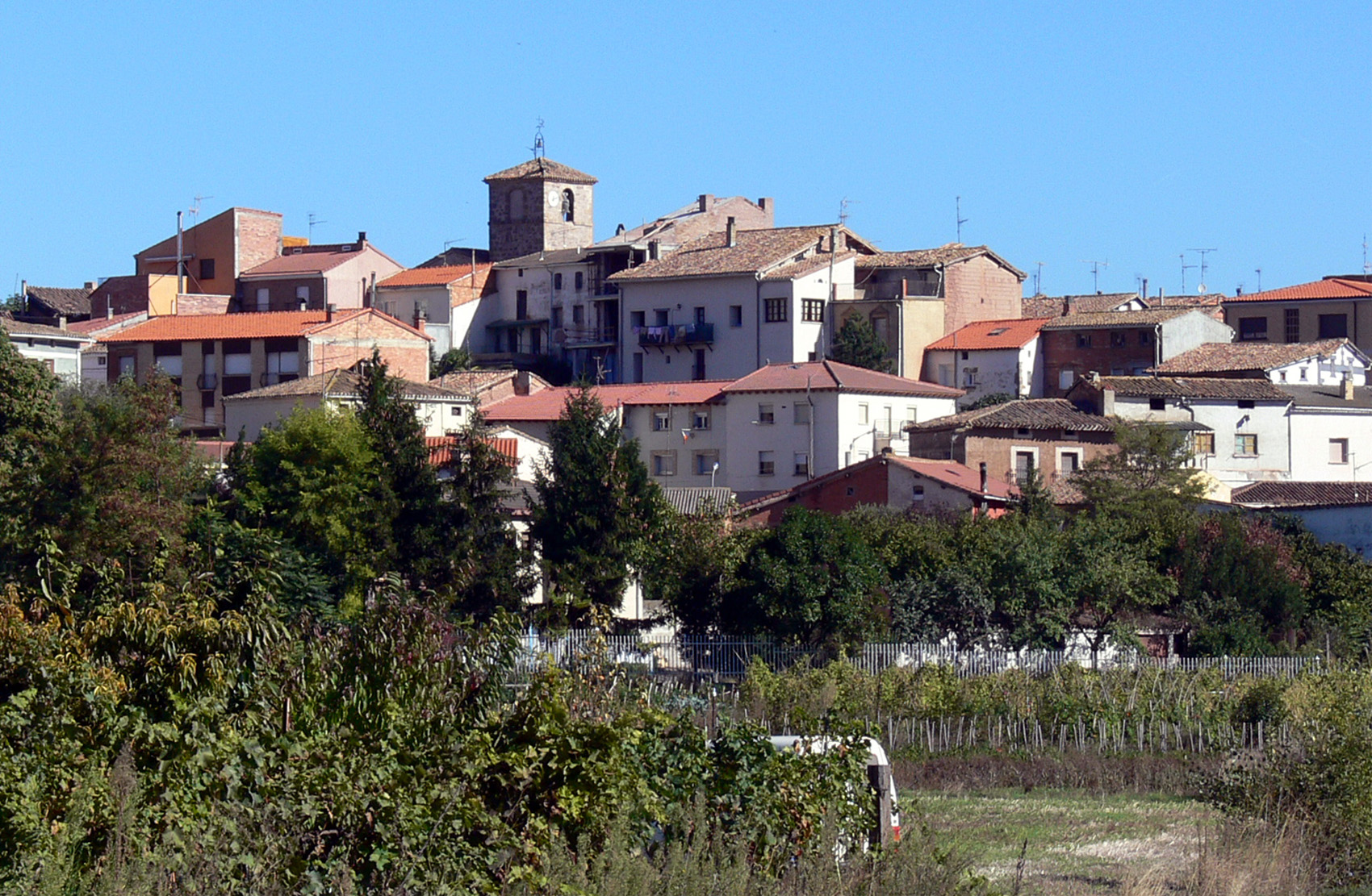 Hormilleja, La Rioja - España.